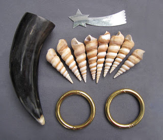 Es considerado en la Regla Osha-Ifà como una deidad infantil y es muy adorado por la Regla Arará, aunque, no obstante su culto se practica muy poco en Cuba es reconocido como el Orisha femenino de la fertilidad, está relacionado con la fecundación y los niños que nacen consagrados.